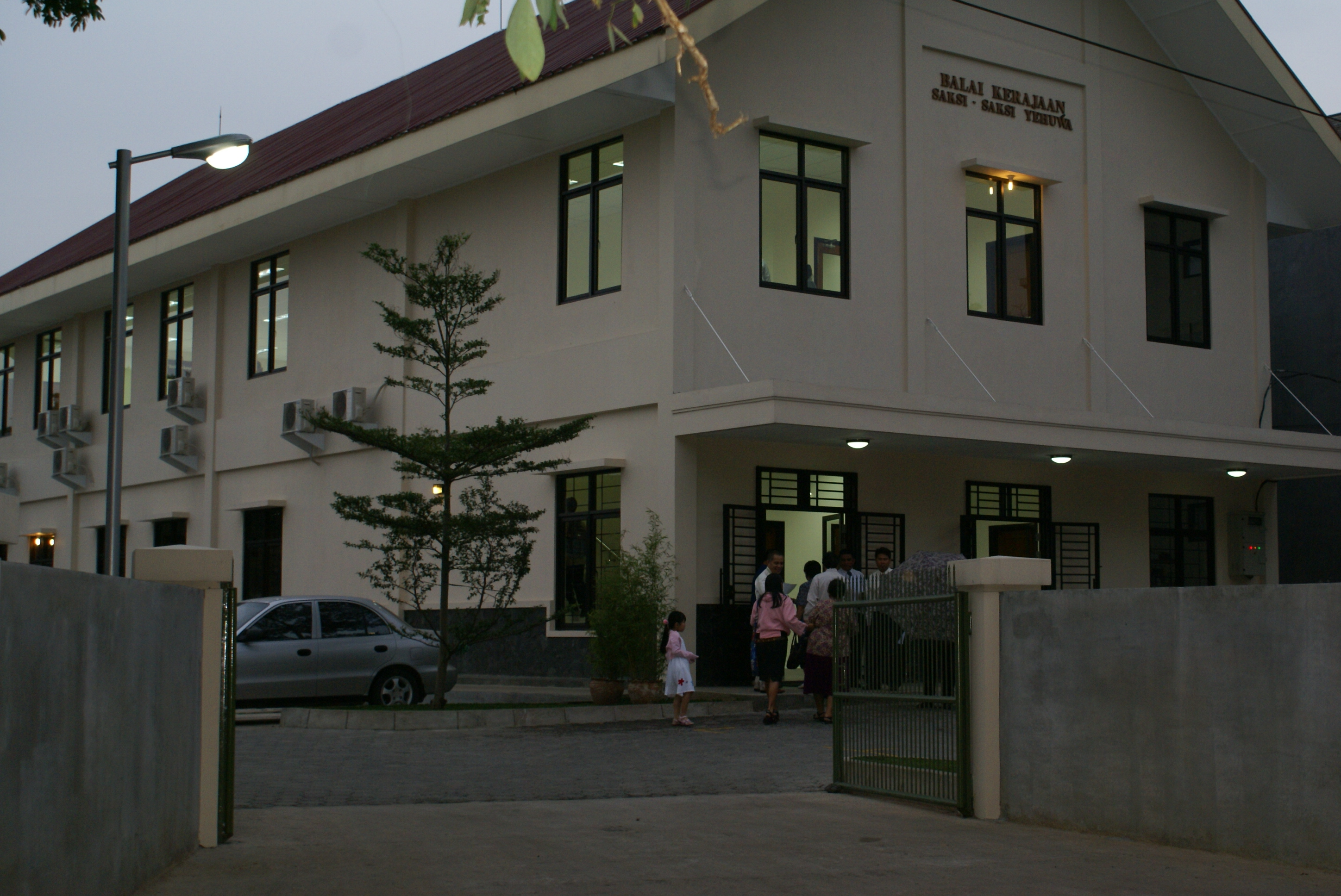 Balai Kerajaan Saksi-Saksi Yehuwa di Bandung, Jawa Barat